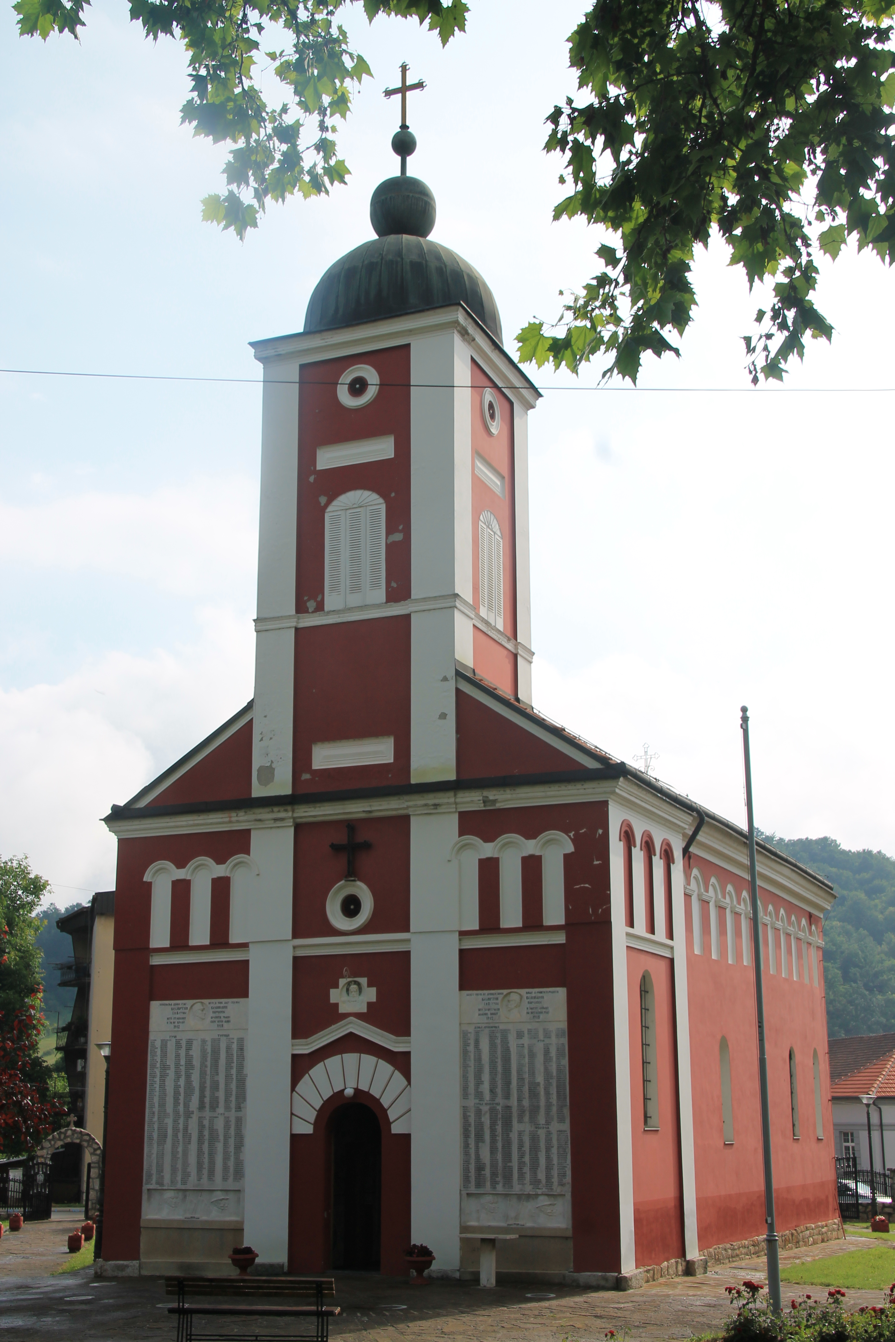 Crkva Sv. Gavrila (Guča)